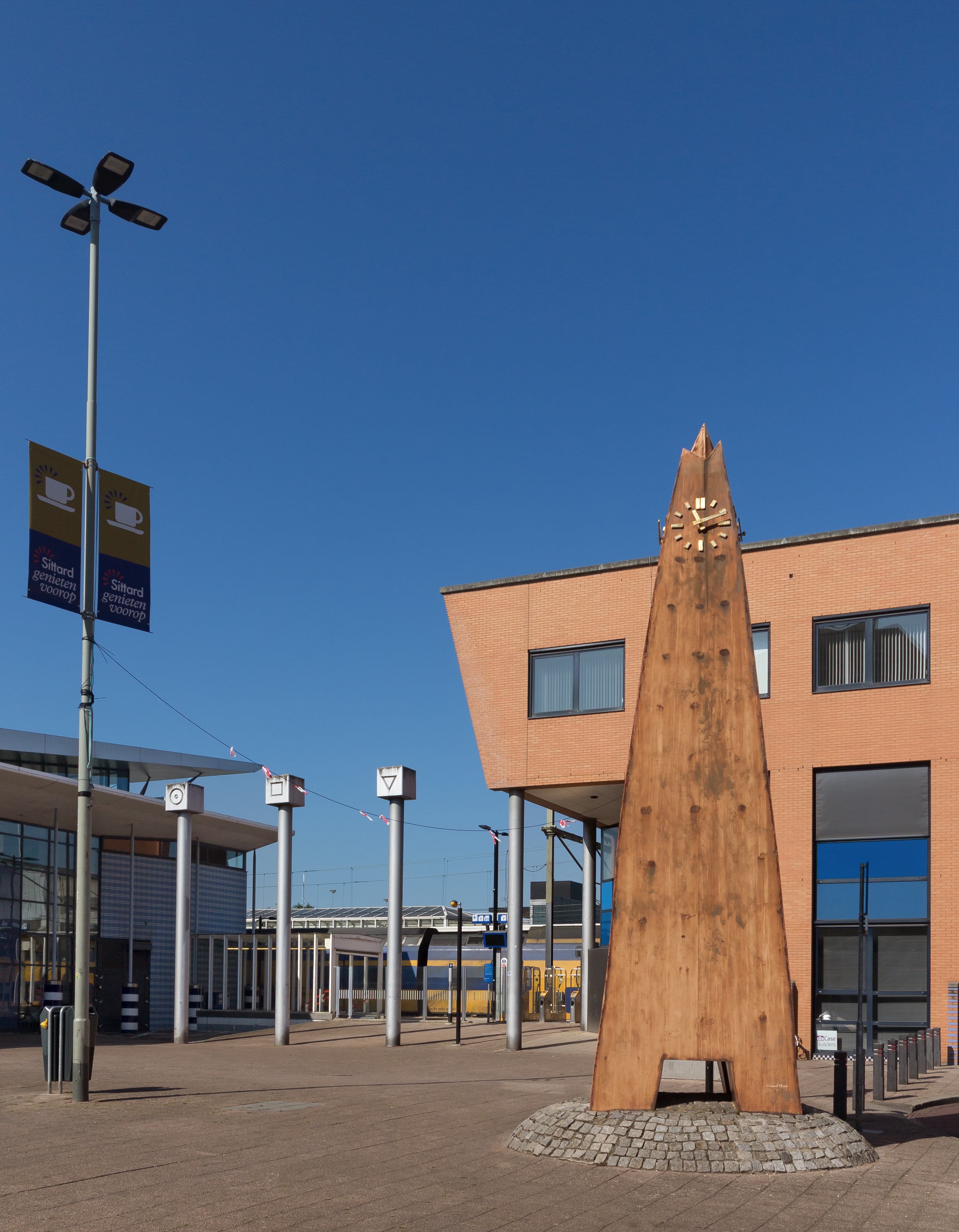 Sittard, sculptuur bij het centrale treinstation